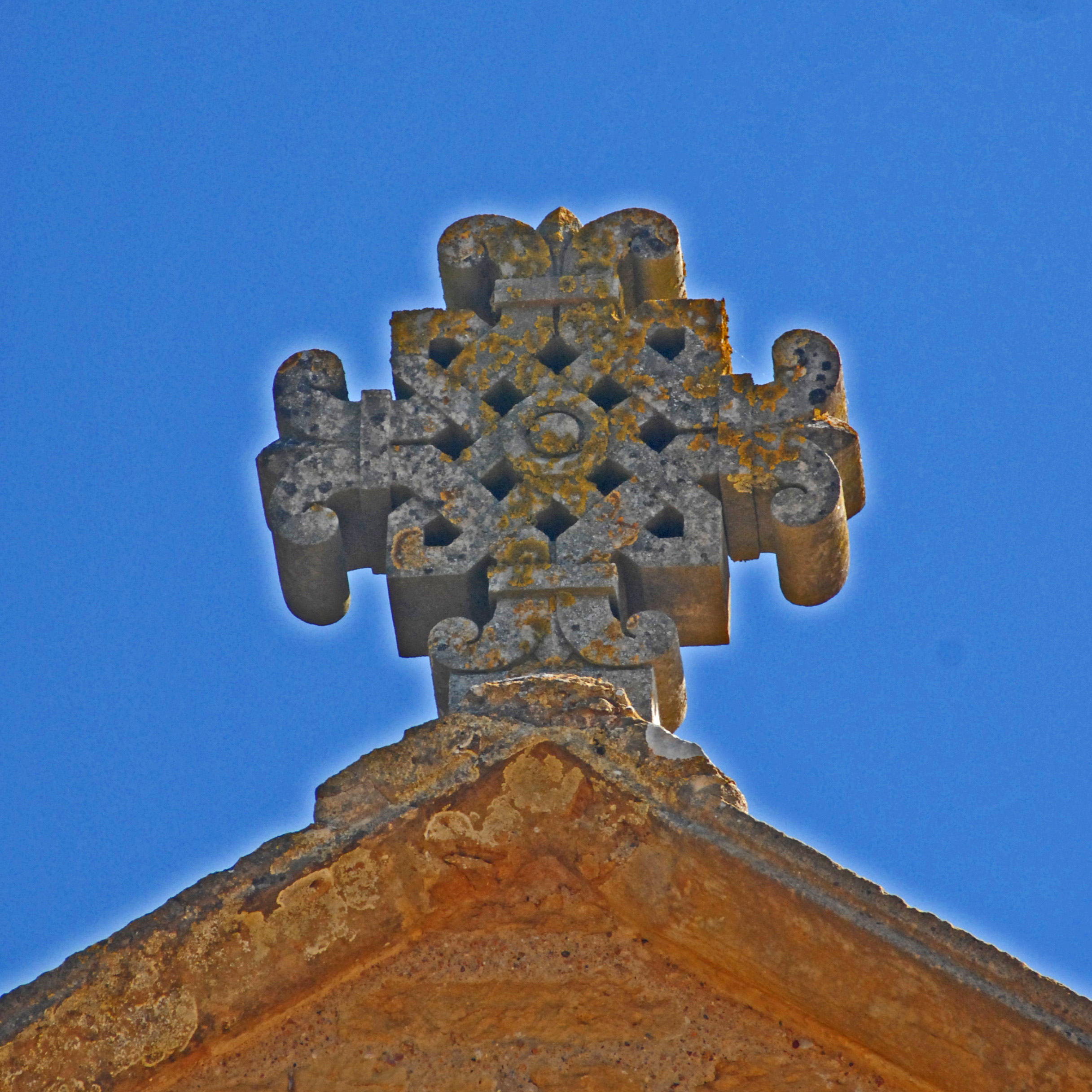 Sts-Pierre-et-Paul de Montceaux-l'Étoile, Giebelkreuz